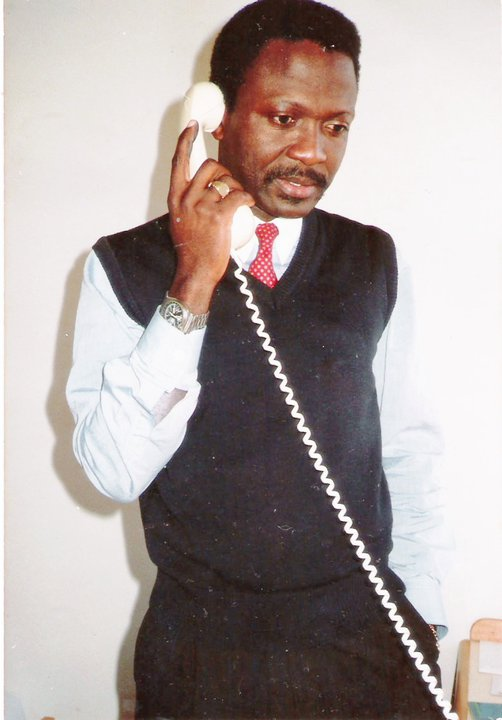 Adolosi Mango no seu escritorio em Bonn